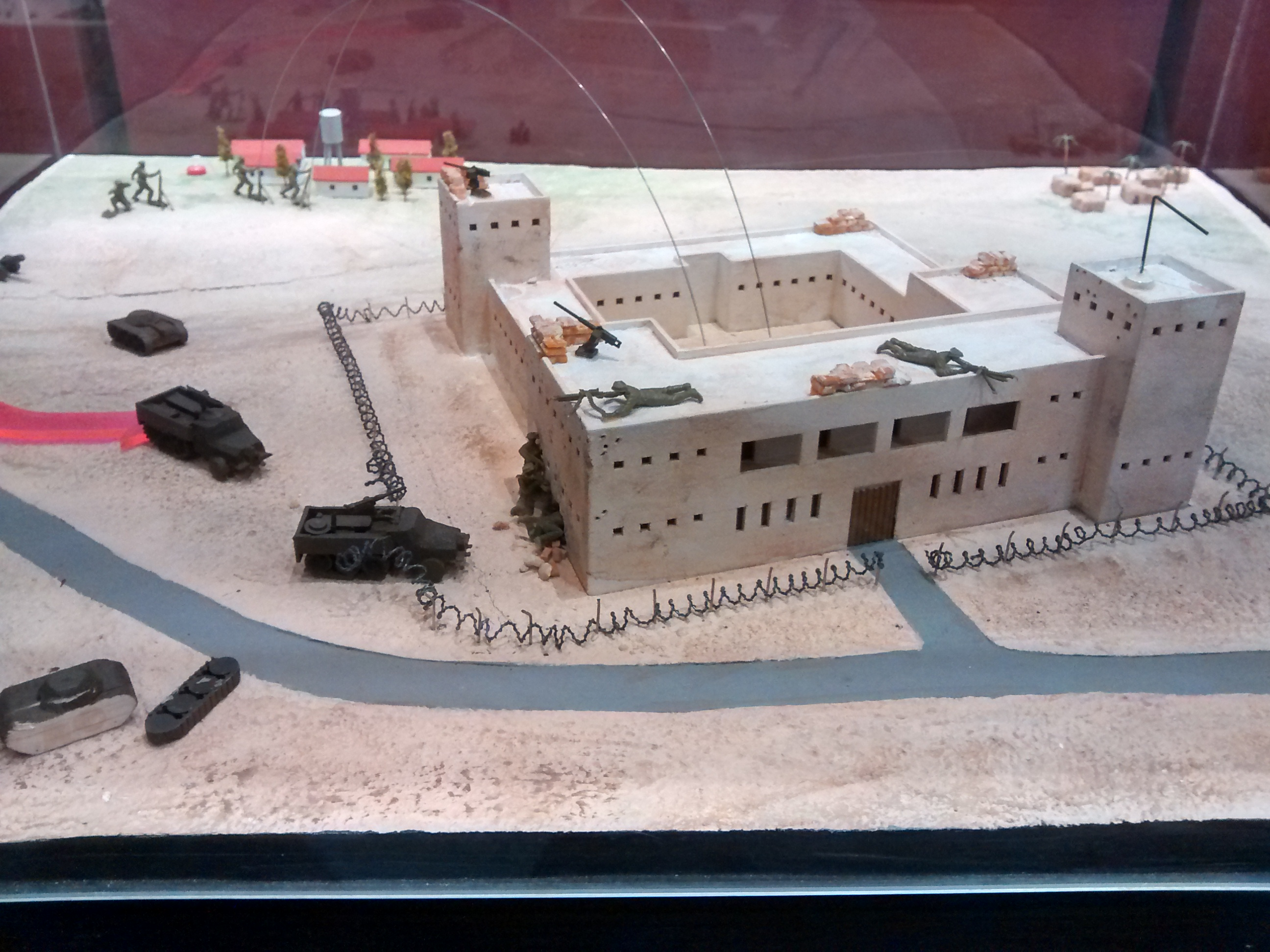 מוזיאון לח"י, הנקרא גם בית יאיר על שם מפקד לח"י, אברהם שטרן ("יאיר"), נמצא בבנין שבו נרצח שטרן על ידי קצין בולשת בריטי.